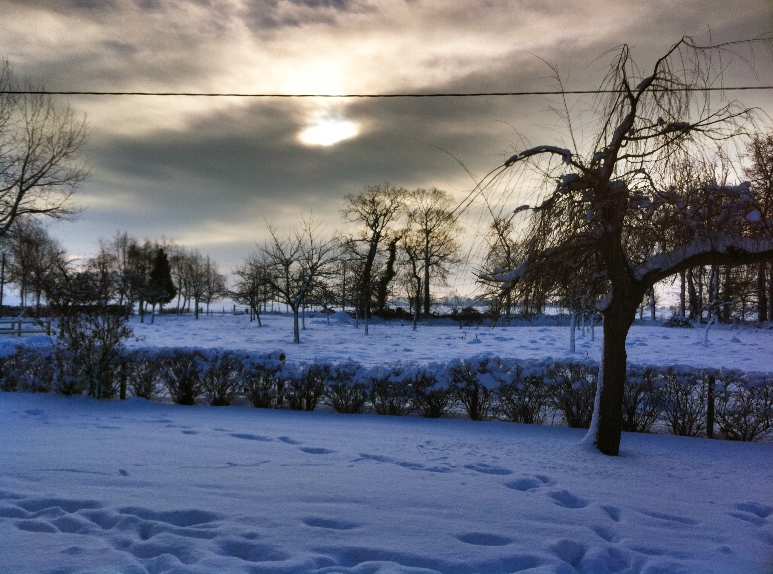 Anglesqueville l'hiver.